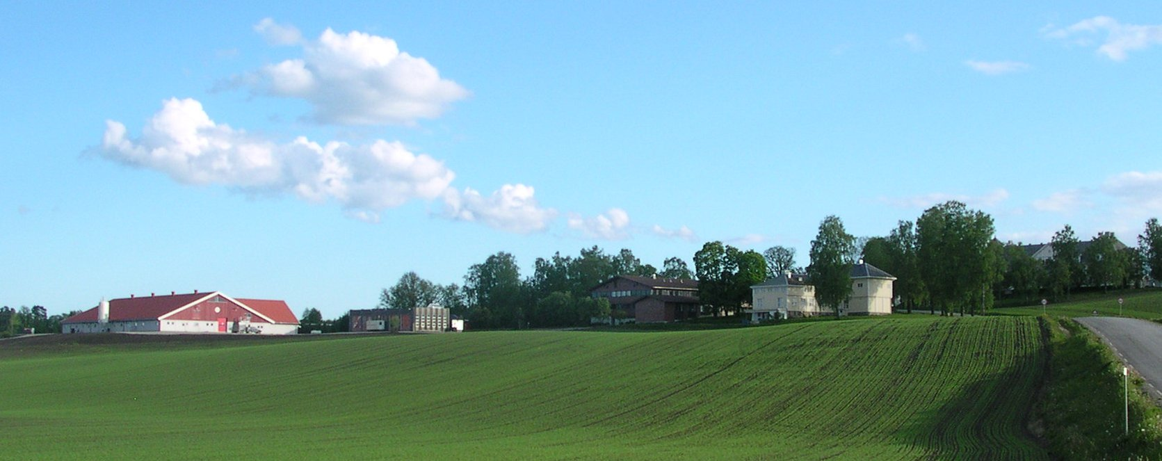 Jønsberg landbruksskole